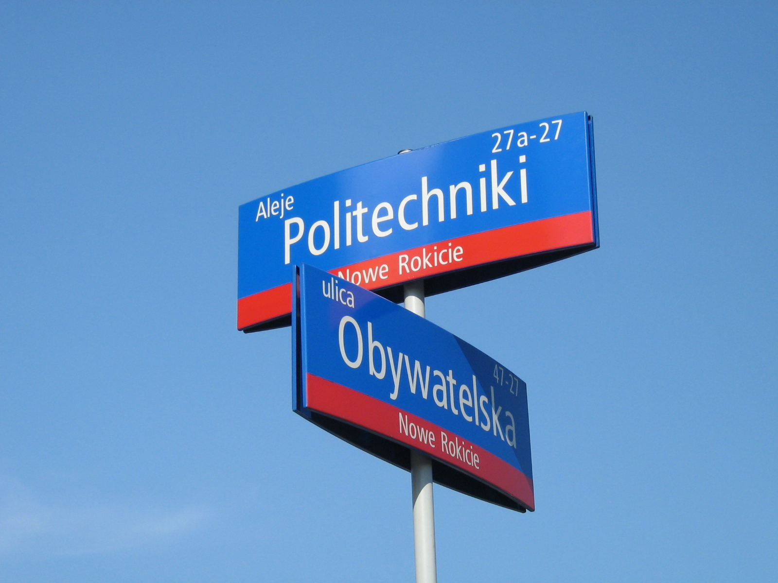 System Informacji Miejskiej w Łodzi - skrzyżowanie al. Politechniki i ul. Obywatelskiej